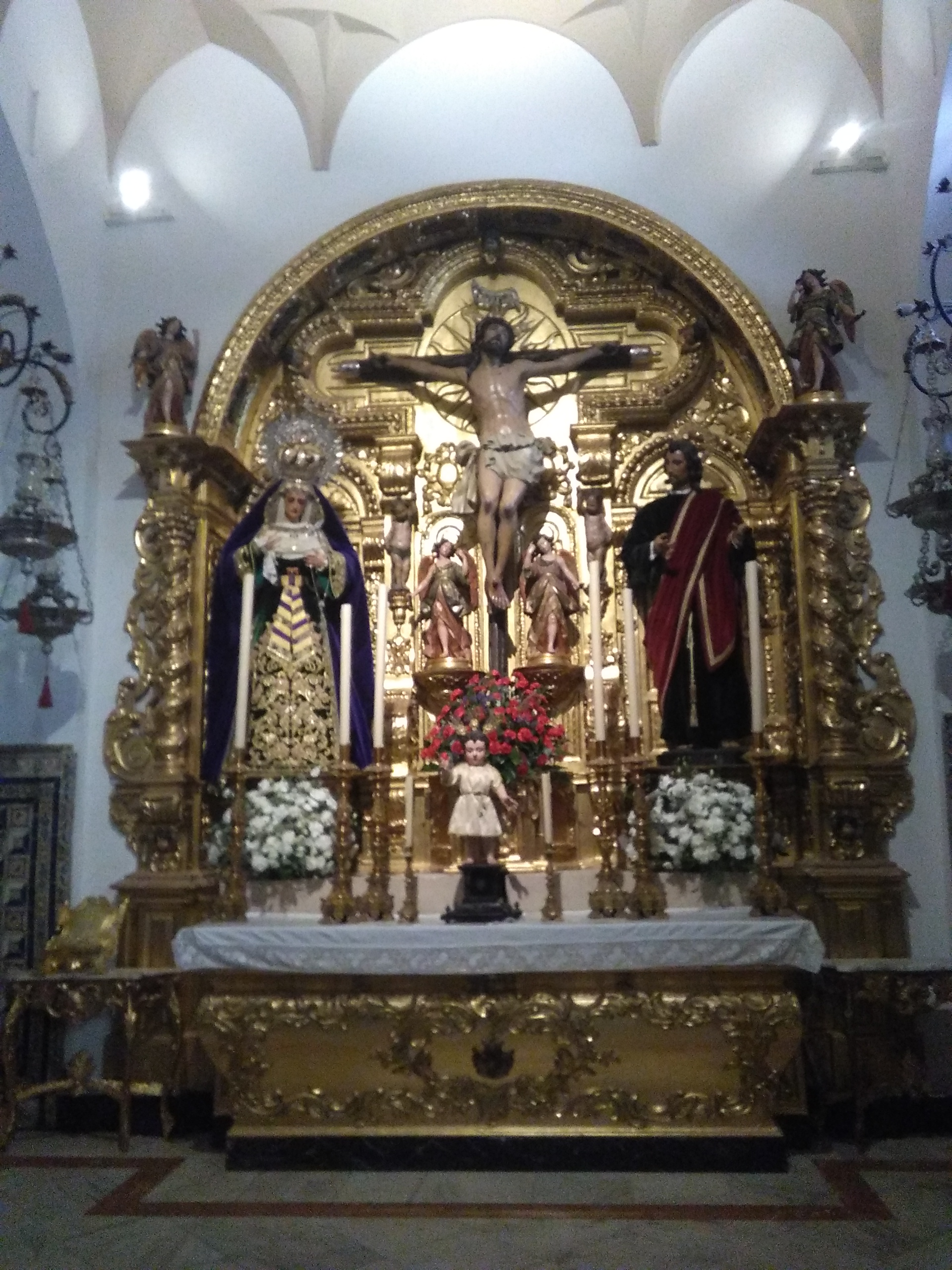 Retablo altar de los titulares de la hermandad de la Exaltación. Iglesia de Santa Catalina de Sevilla.